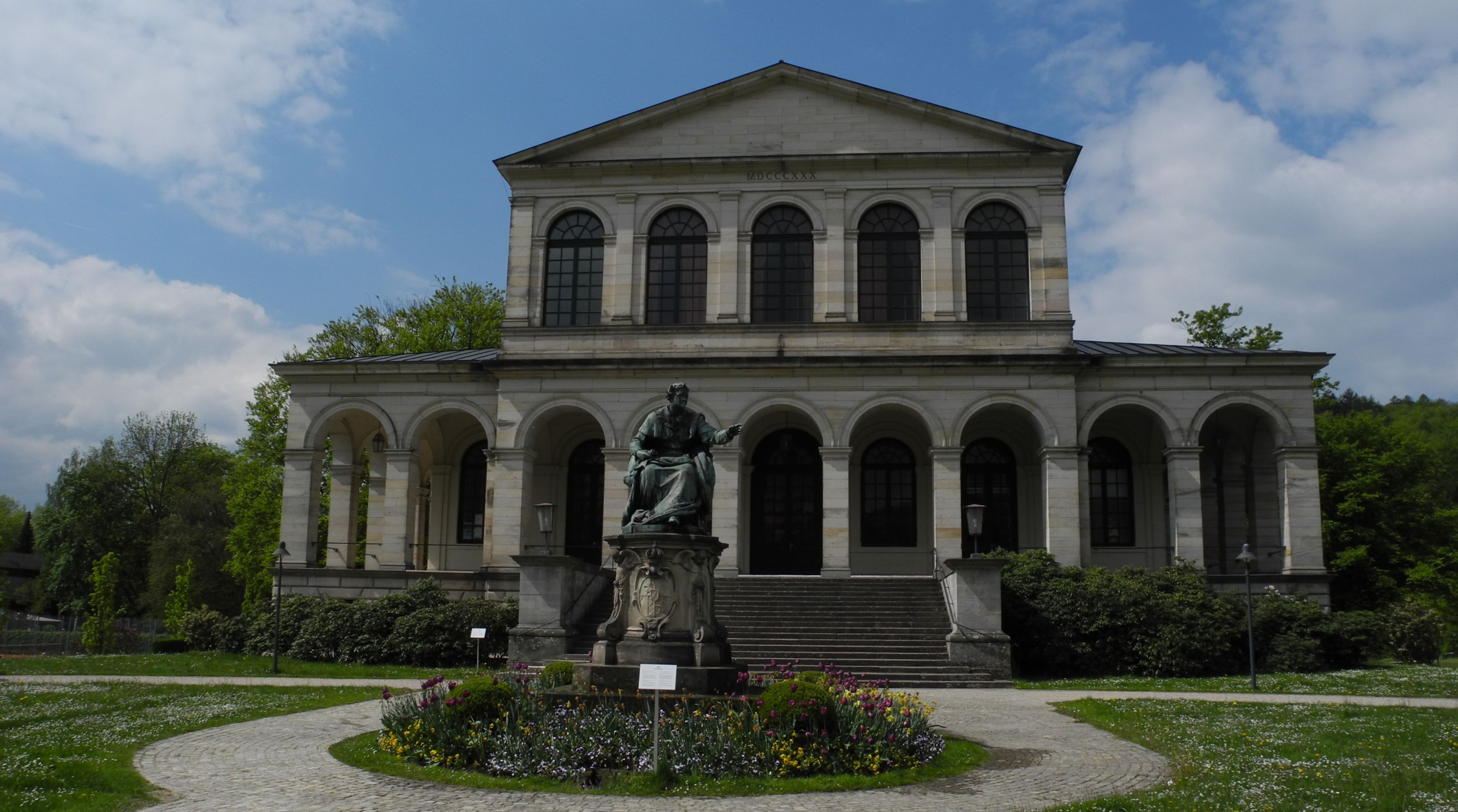 Bad Brückenau - Kursaal im Staatsbad